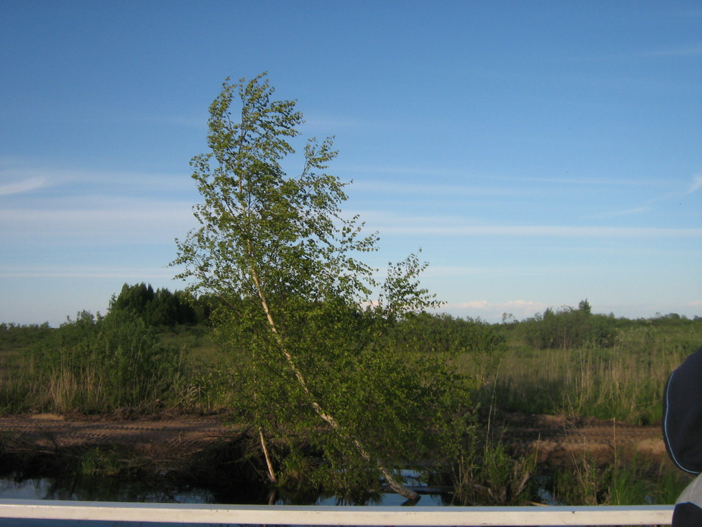 Piirissaare luhaniidud